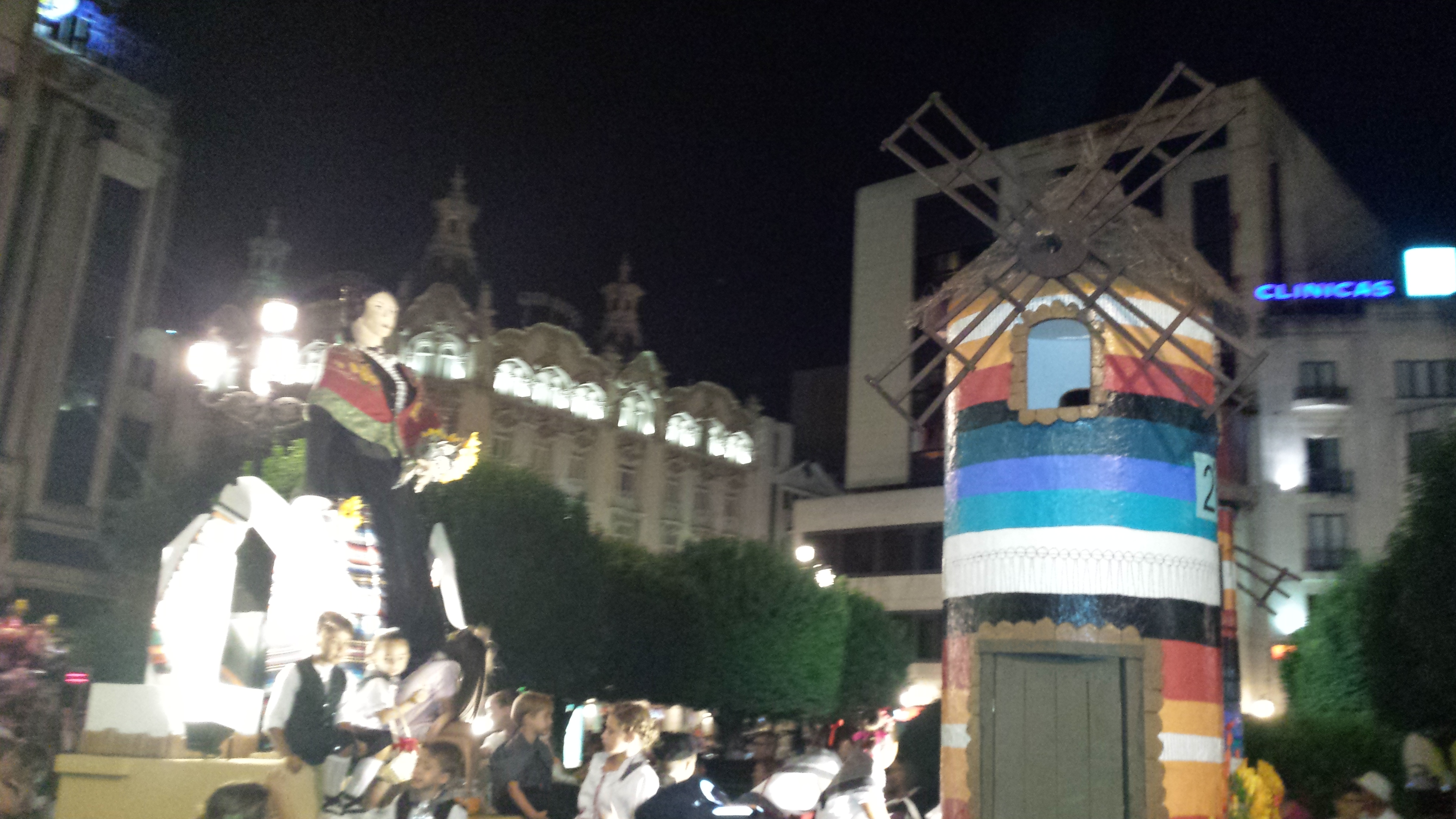 Cabalgata de la Feria de Albacete 2014. Manchega. Molino de viento.